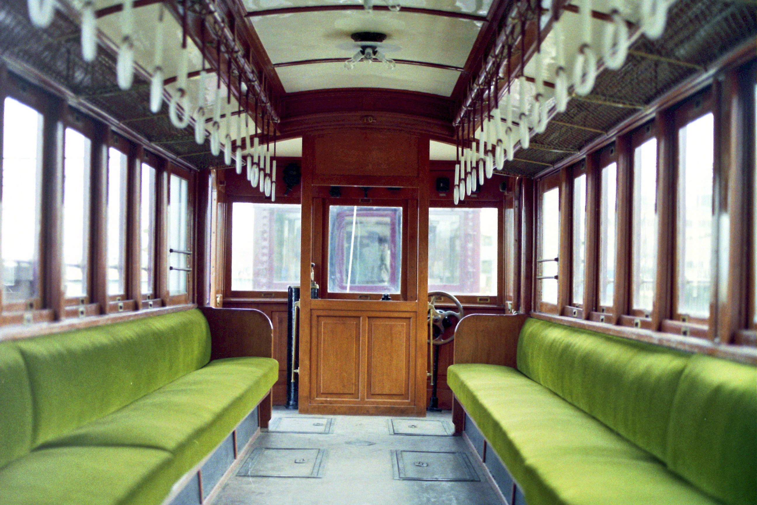 新京阪10形保存車車内